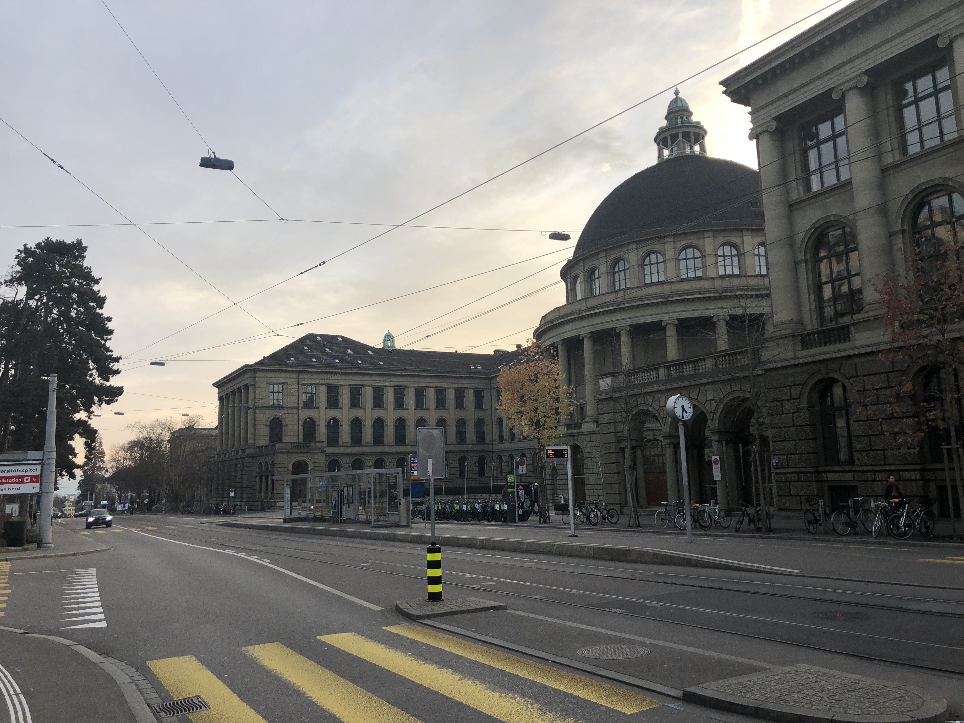 ETH Zürich Hauptgebäude an der Rämistrasse